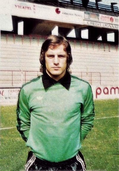 Pierrick Hiard,1978 (portiere di FS Bastia dal 1978 al 1983), 'Panini Foootball 1978 - 1979', Figurina Panini.